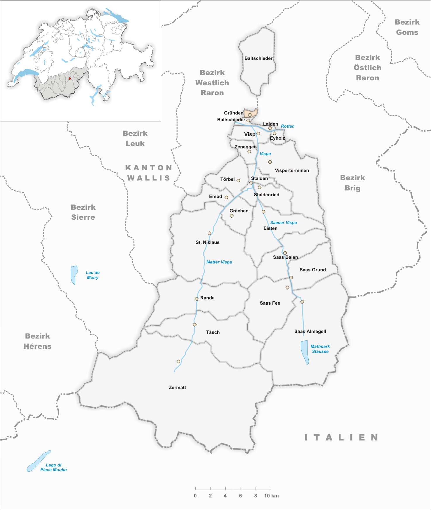 Municipality Gründen